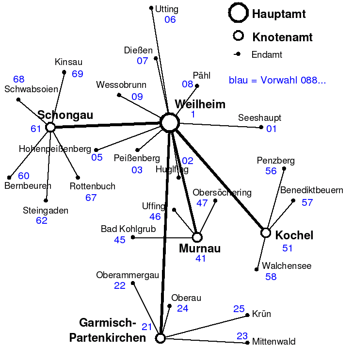 Telefonnetzstruktur des Hauptamtes (HVSt) Weilheim nach der Eingliederung in das deutsche Landesfernwahlnetz 1962